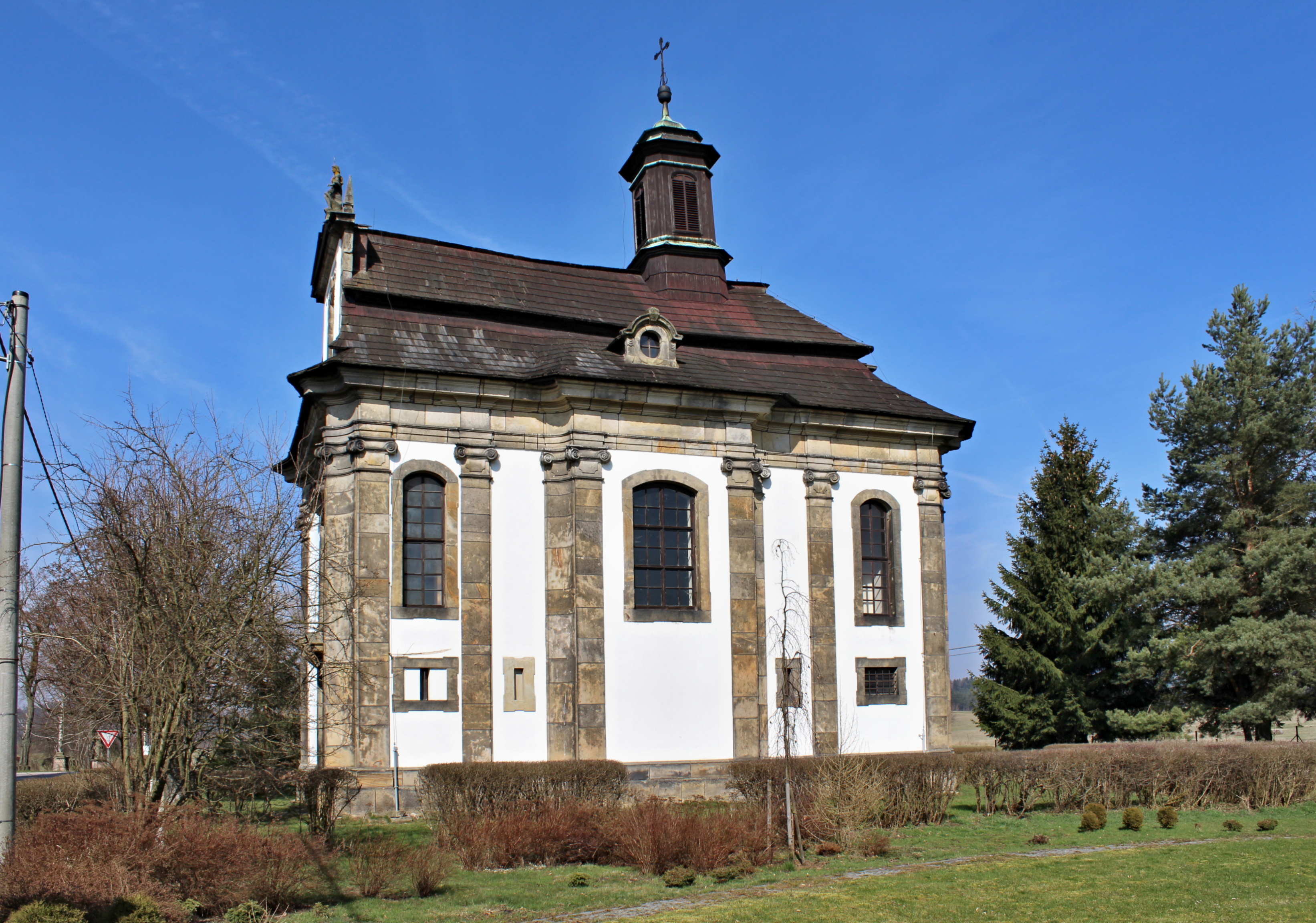 Kostel sv. Jana Nepomuckého ve Velkém Valtinově